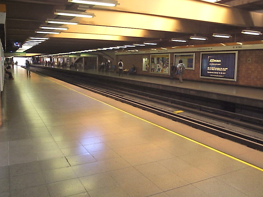 Estación Santa Ana Autor:Alstradiaan Alstradiaan Blog Fecha:Abril de 2005 Fotografía tomada con una cámara digital Olympus camedia D-395 de 3.2 megapixeles